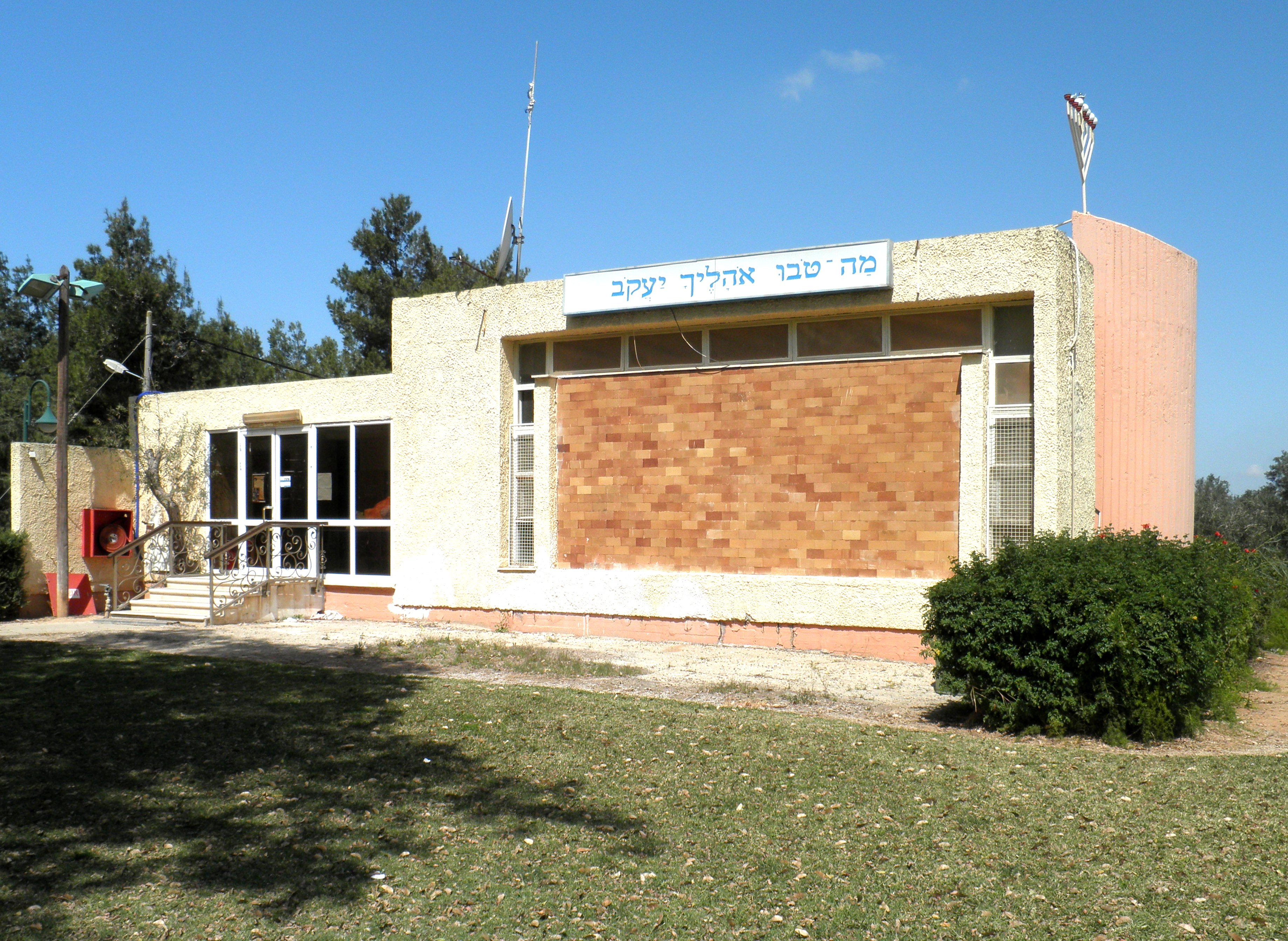 בית הכנסת